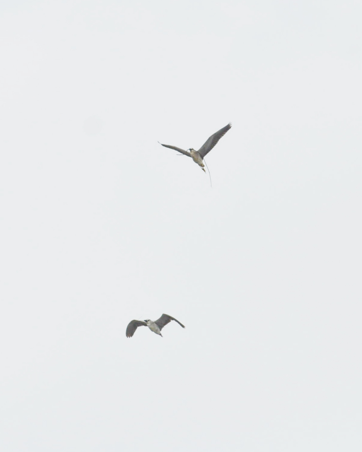 Above Laut dendang